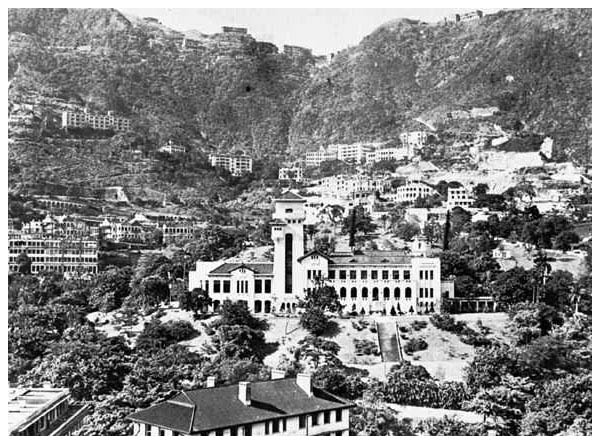 1945年香港總督府(現香港禮賓府)遠景